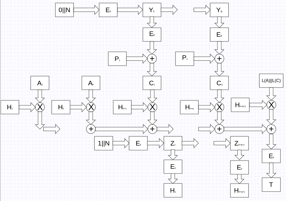 Схема